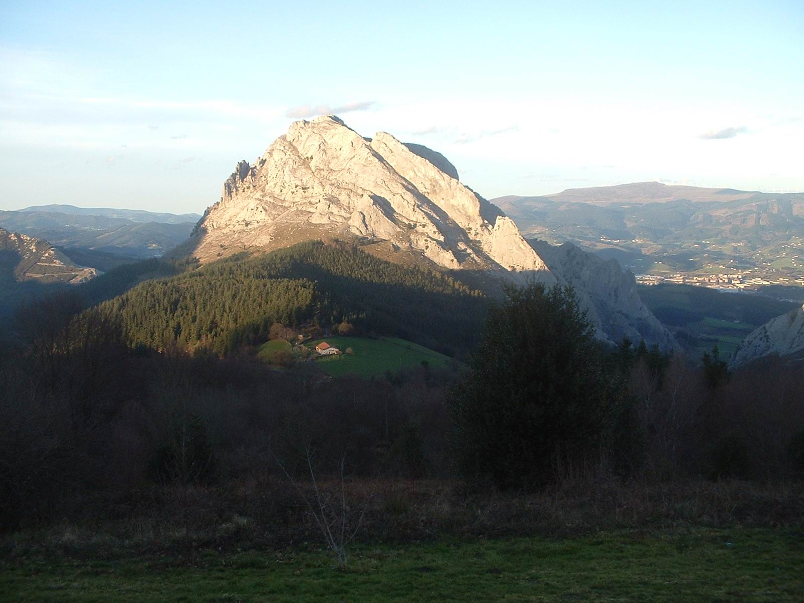 Foto hecha por mi desde Urkiola